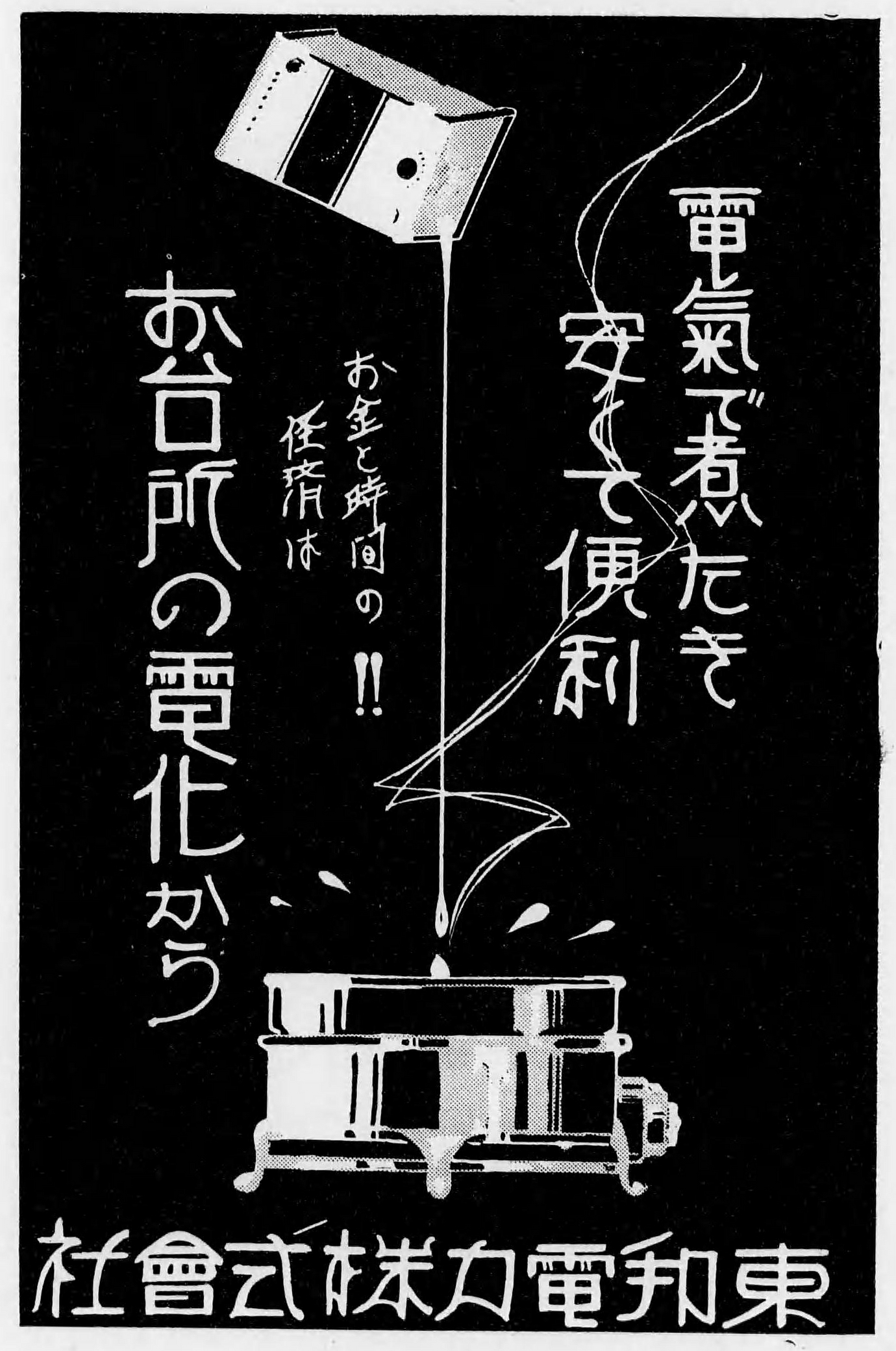 1928年発行『名古屋商工案内』に掲載された東邦電力の広告。家庭電化を宣伝する内容。